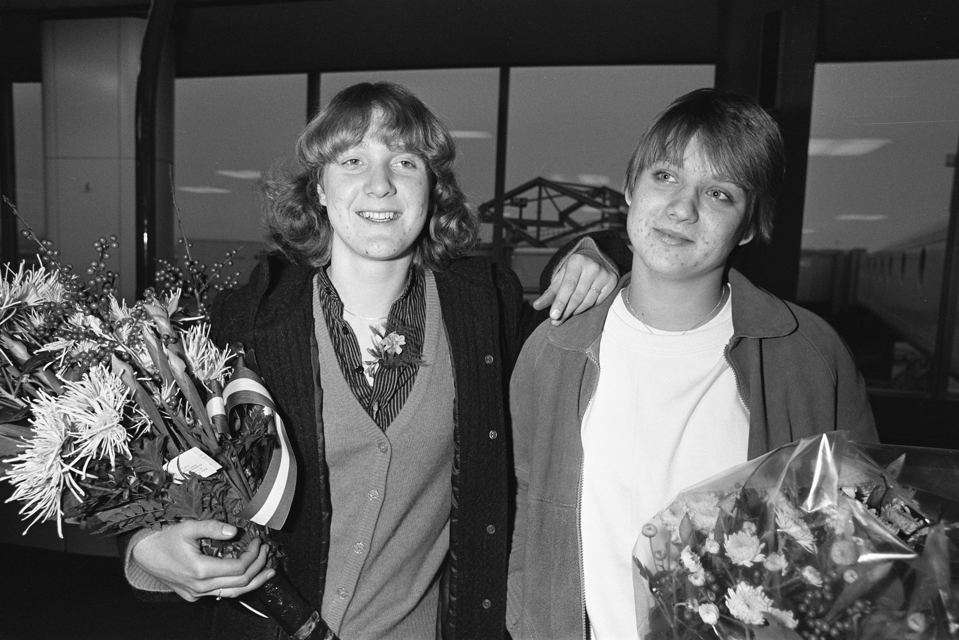 Collectie / Archief : Fotocollectie Anefo Reportage / Serie : [ onbekend ] Beschrijving : Op Schiphol judodamesploeg aangekomen. Wereldkampioene Anita Staps (l) met Jolanda van Meggelen (r) met bloemen op Schiphol Datum : 2 december 1980 Locatie : Noord-Holland, Schiphol Trefwoorden : aankomst en vertrek, judo, portretten, sporters Persoonsnaam : Meggelen, Jolanda van, Staps, Anita Fotograaf : Croes, Rob C. / Anefo Auteursrechthebbende : Nationaal Archief Materiaalsoort : Negatief (zwart/wit) Nummer archiefinventaris : bekijk toegang 2.24.01.05 Bestanddeelnummer : 931-1844